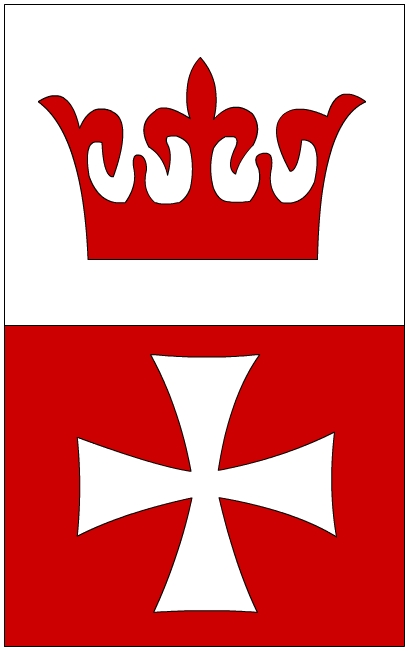 Hanseatic Flag of Königsberg